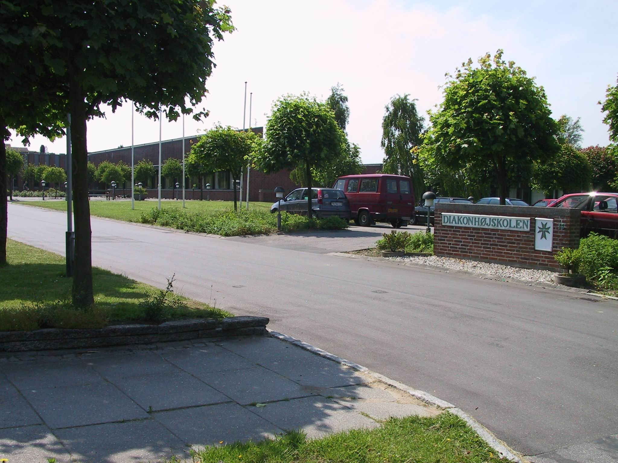 Diakonhøjskolen udefra